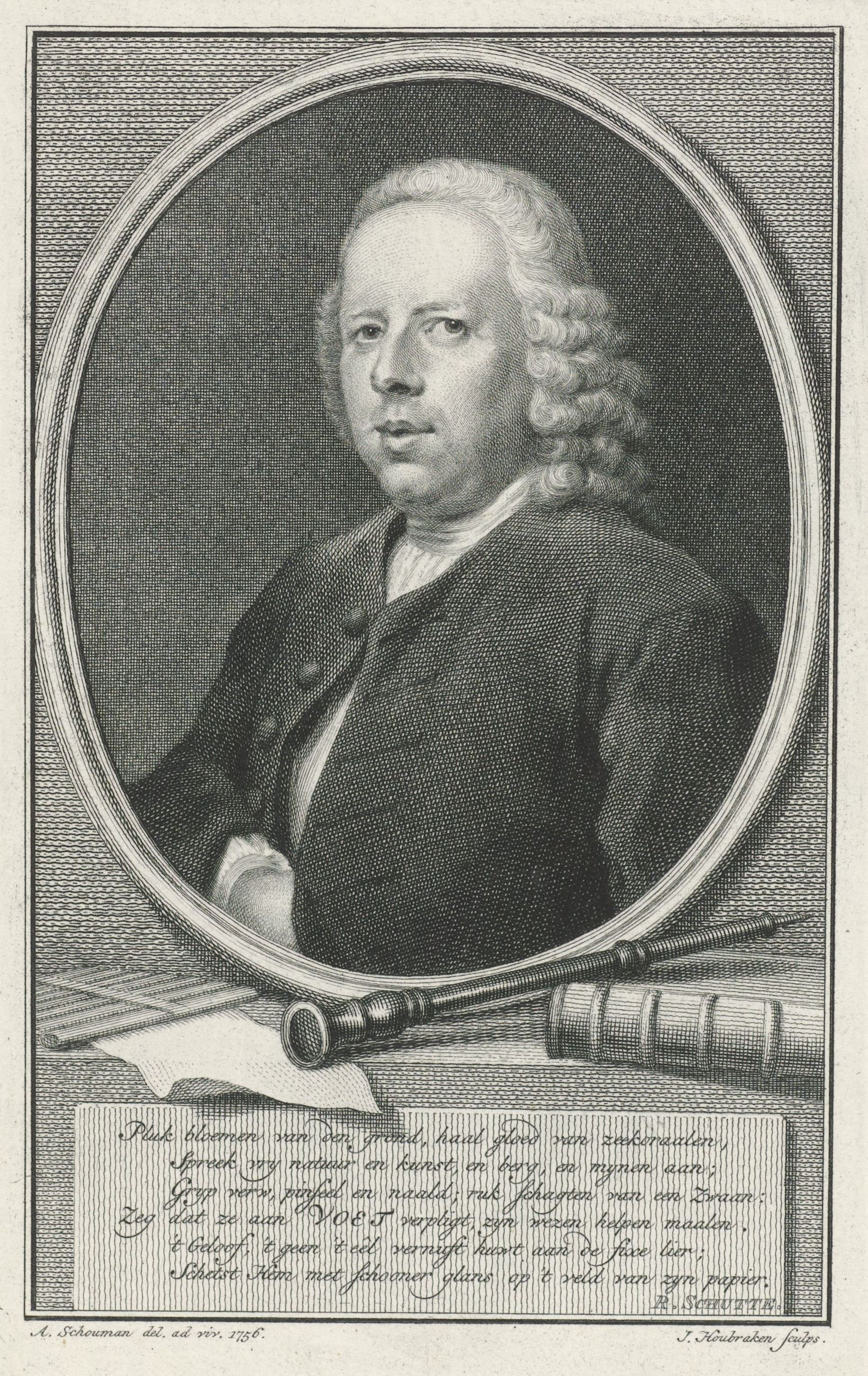 Portret ten halven lijve naar links in een ovaal van Johannes Eusebius Voet in een ovaal medaillon, dat rust op een piëdestal. Op de sokkel eveneens een aantal attributen en een plaquette waarop een zesregelig vers in het Nederlands. Vervaardiger: prentmaker: Jacob Houbraken (vermeld op object) naar tekening van: Aert Schouman (vermeld op object) schrijver: Rutger Schutte (vermeld op object) Plaats vervaardiging: Amsterdam Datering:1756 - 1780 Rijksmuseum RP-P-1937-890